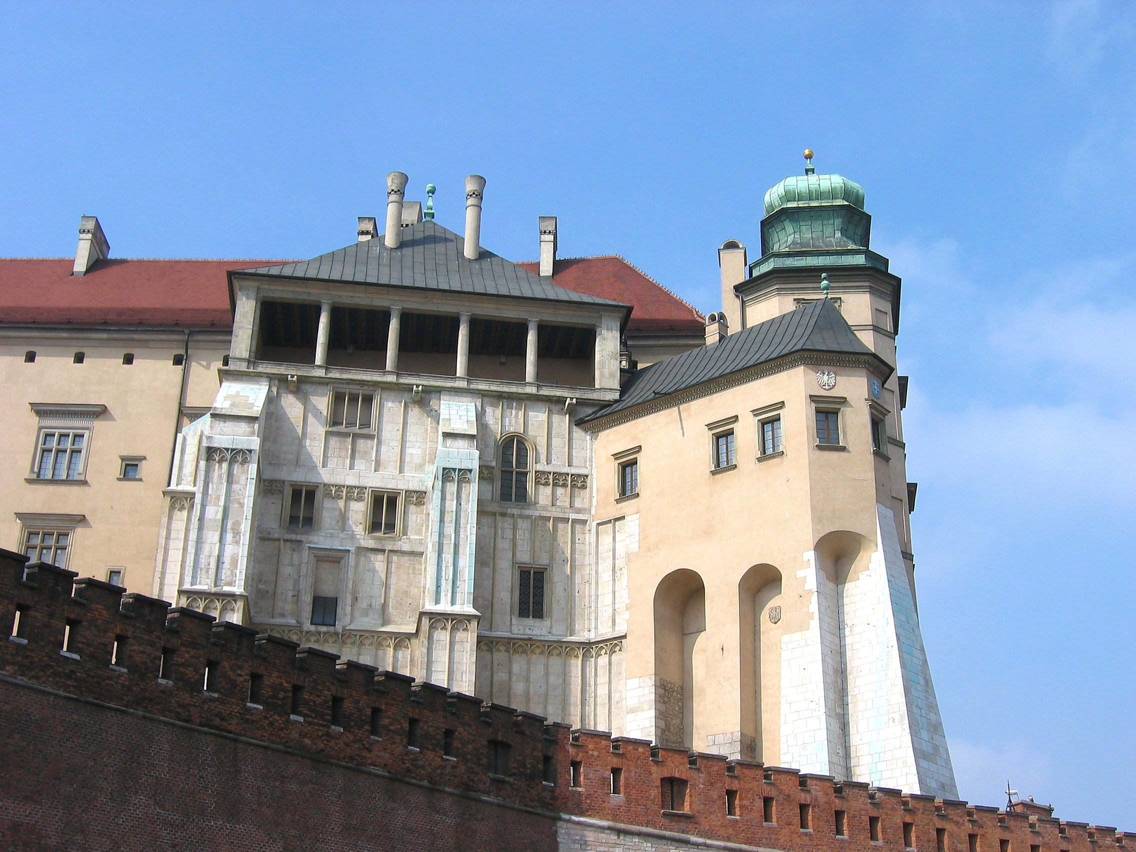 Wawel Poland, Kurza Stopka tower